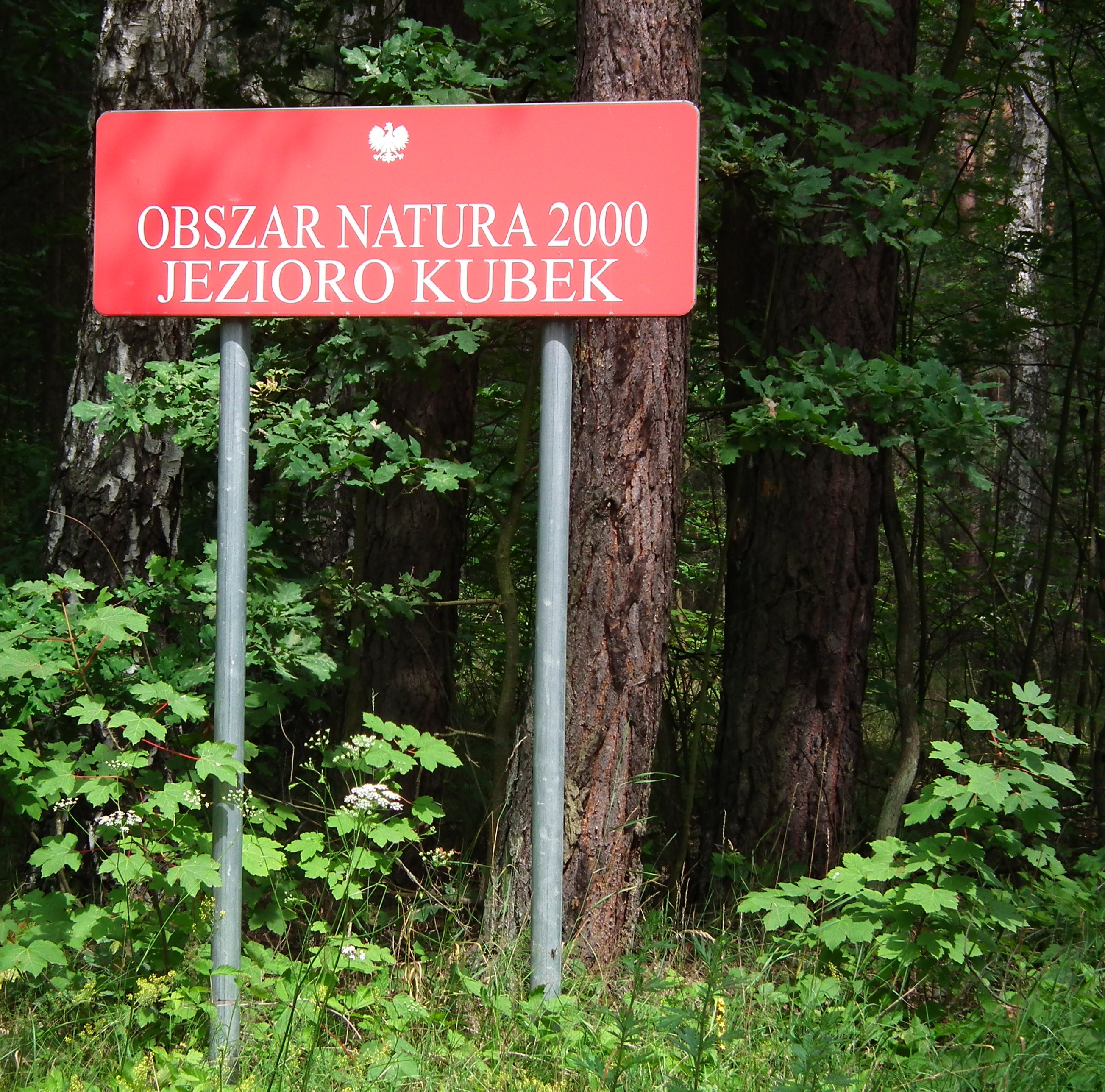 Obszar Natura 2000 Jezioro Kubek (koło Sierakowa).